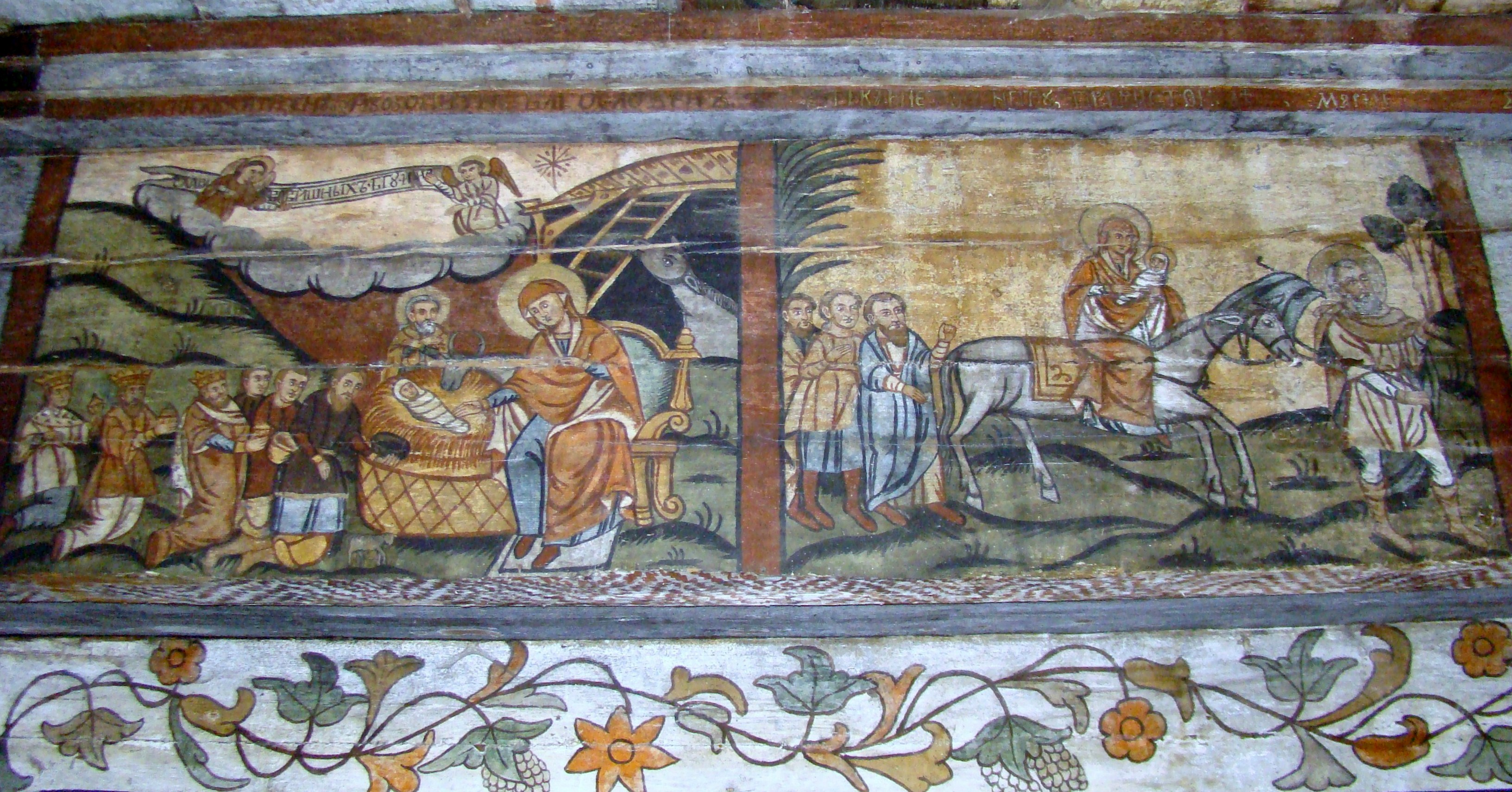 Biserica de lemn "Sfântul Nicolae", sat BOGDAN VODĂ